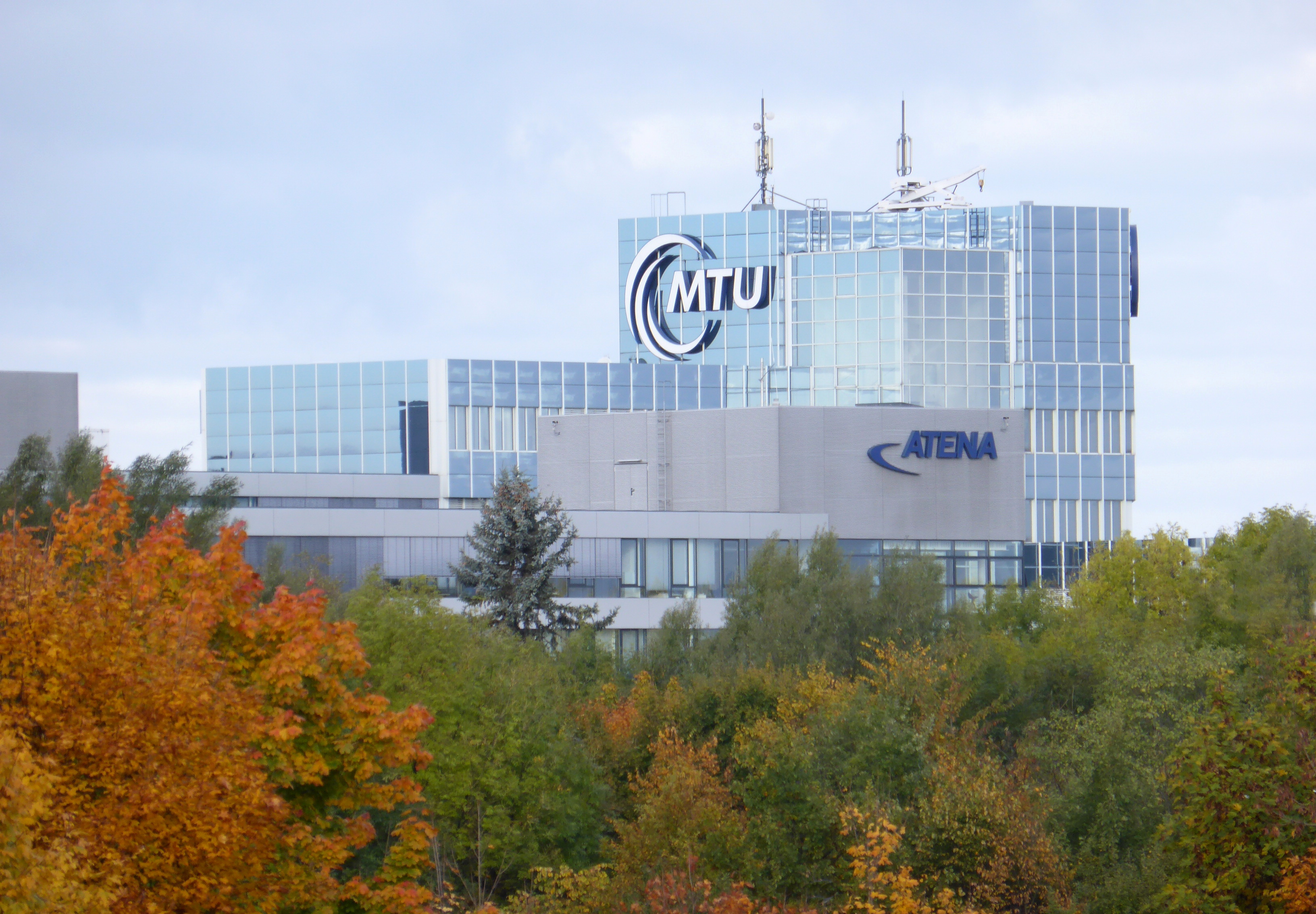 Gebäude der MTU Areo Engines und der Silver Atena Electronic Systems Engineering in München.